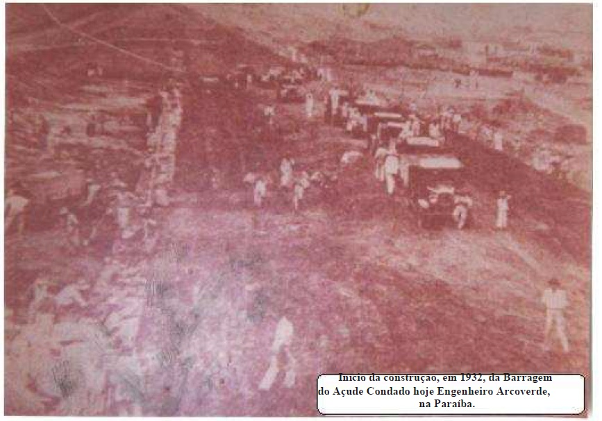 Acude Engenheiro Arco verde em construção